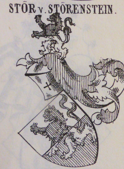 Wappen der der Stör von Störenstein